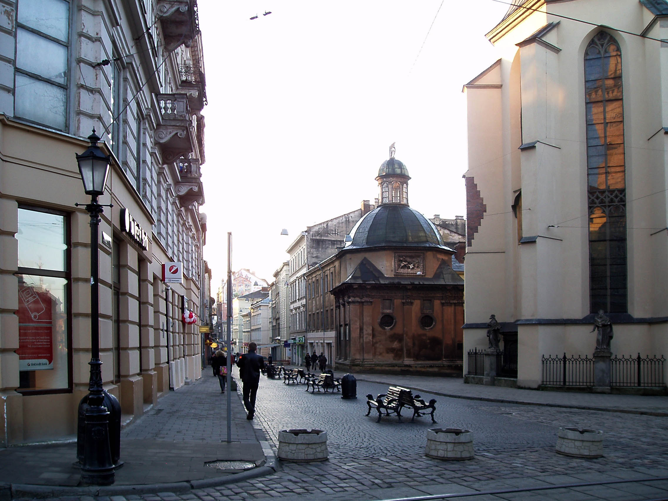 Вулиця Галицька у Львові